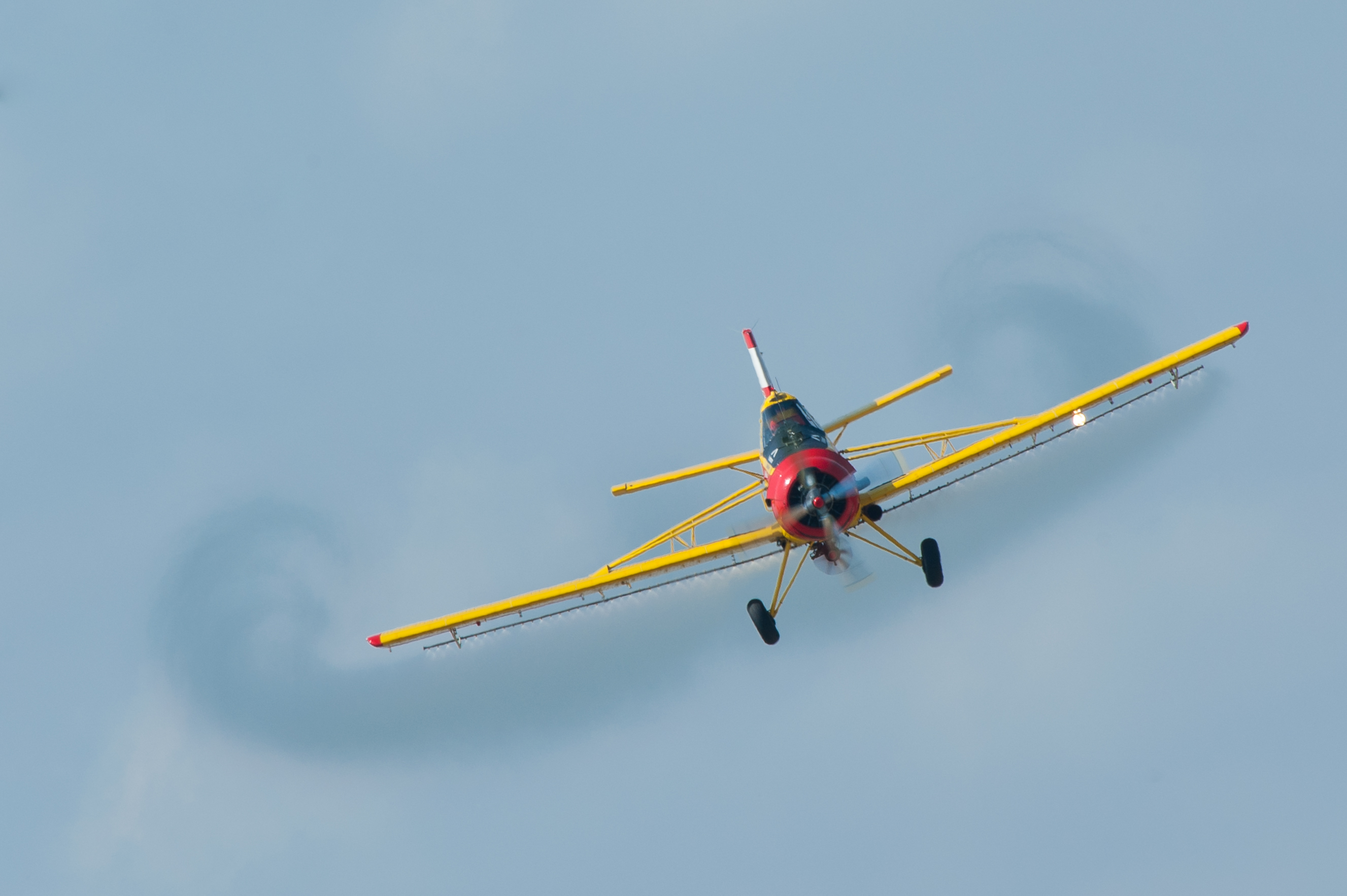 Agrarflieger Gehling PLZ-106 AR Kruk beim Oldtimer Fliegertreffen, Flugfeld Hahnweide 2013